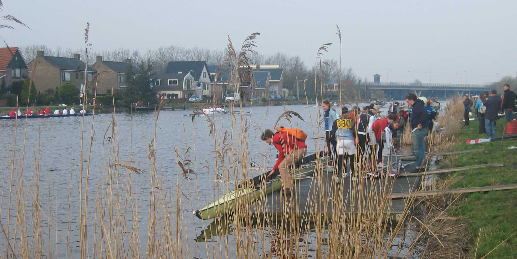 eigen foto, geen auteursrechten Categorie:Afbeelding landschap